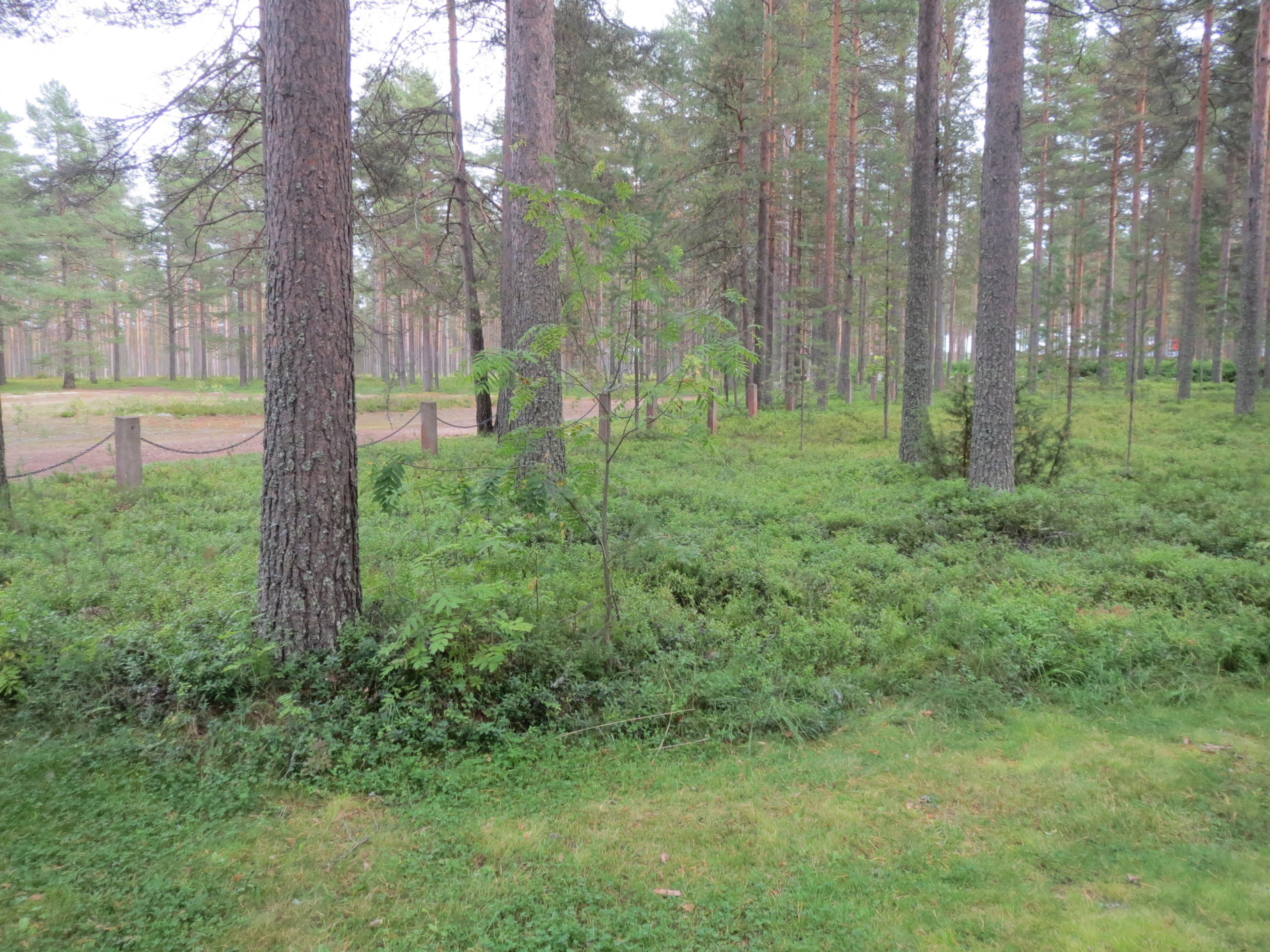 Kuhmon hautausmaan muistolehto kankaalla